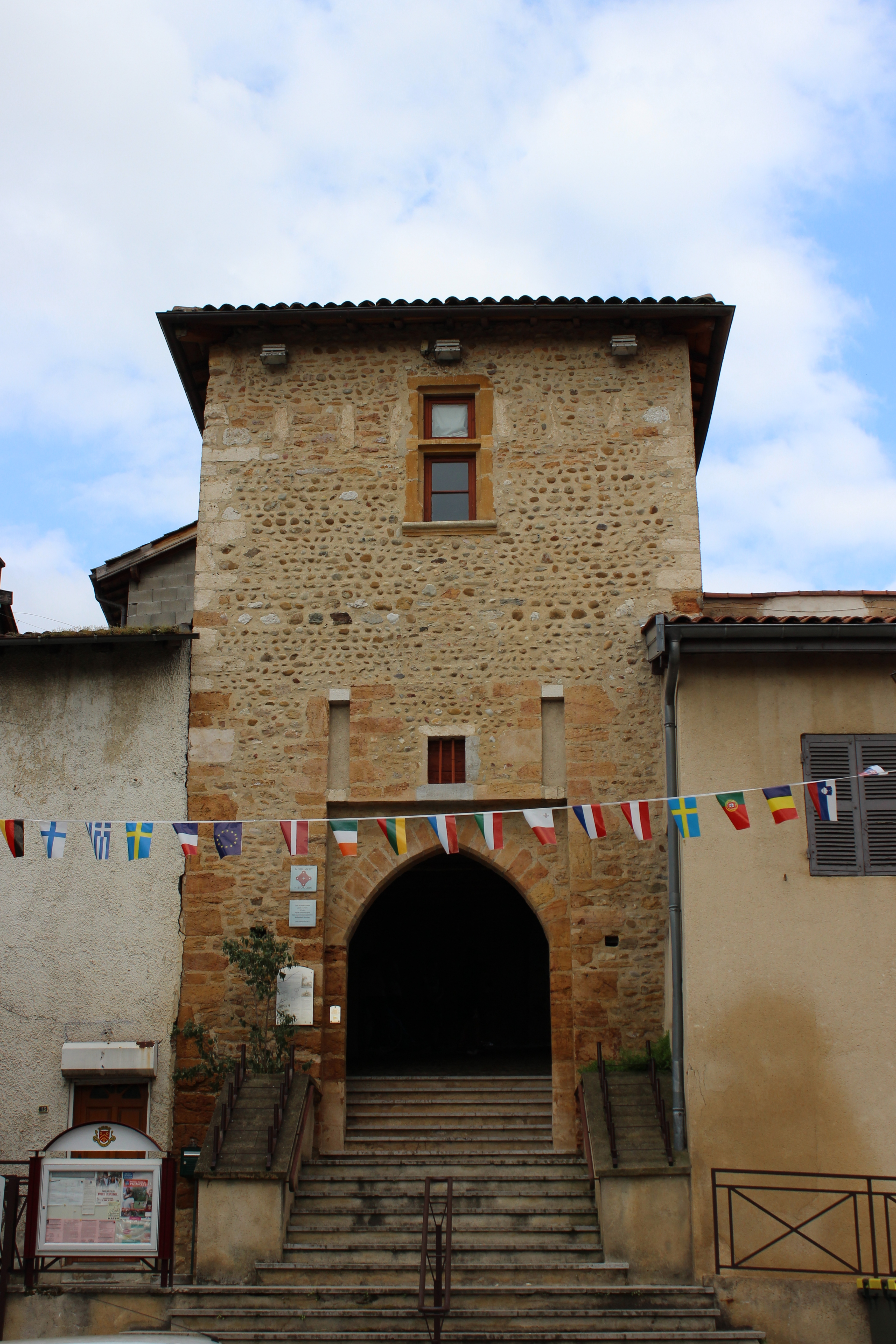 Porte dite du fortin à Genay.